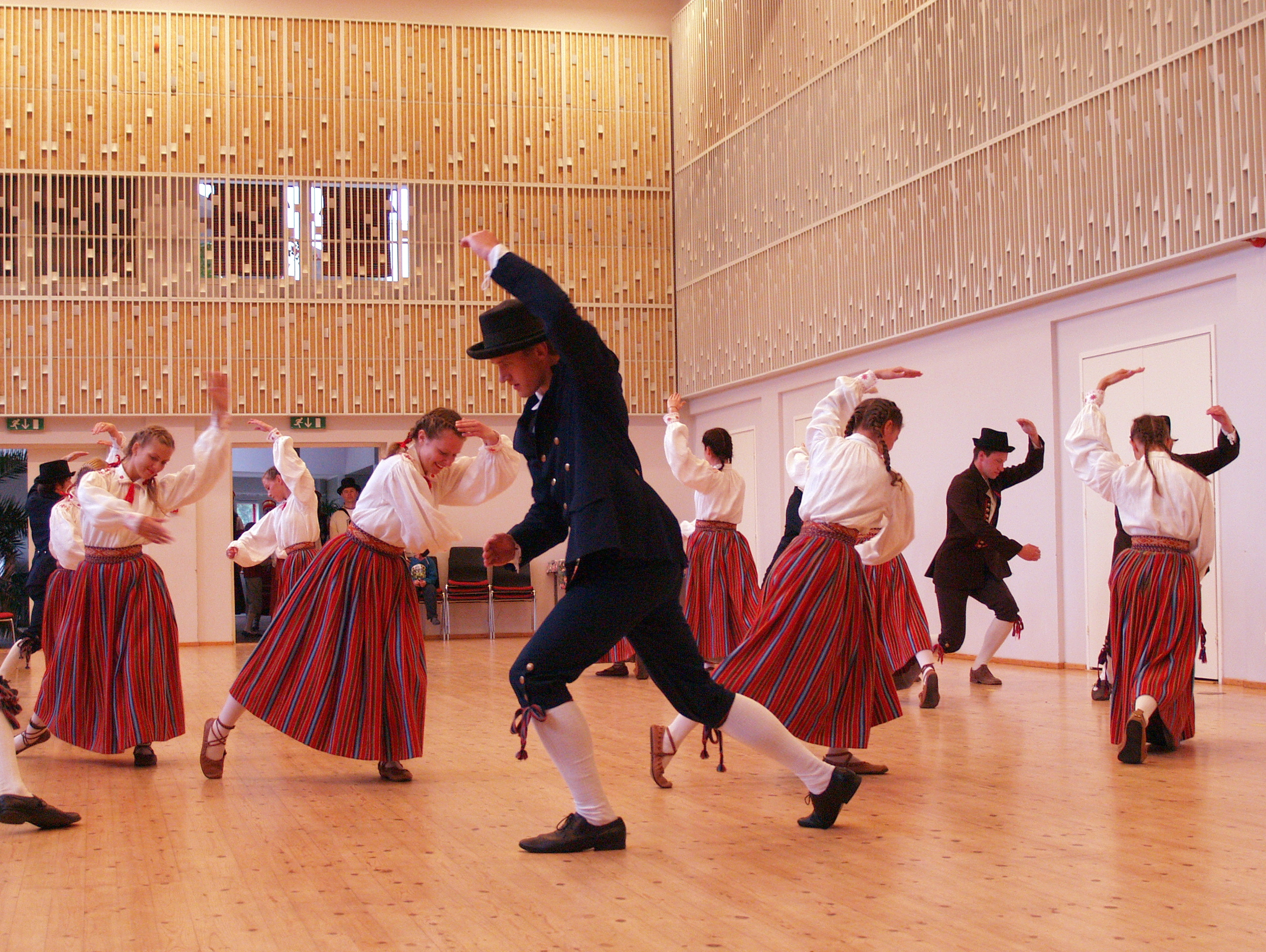 Tartu Ülikooli Rahvakunstiansambli kontsert Kihnu rahvamajas.